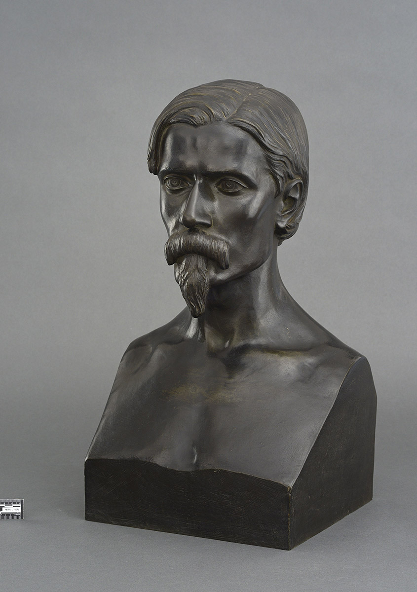 Joseph Hugues Fabisch, Ludovic Penin, médailleur, vers 1868